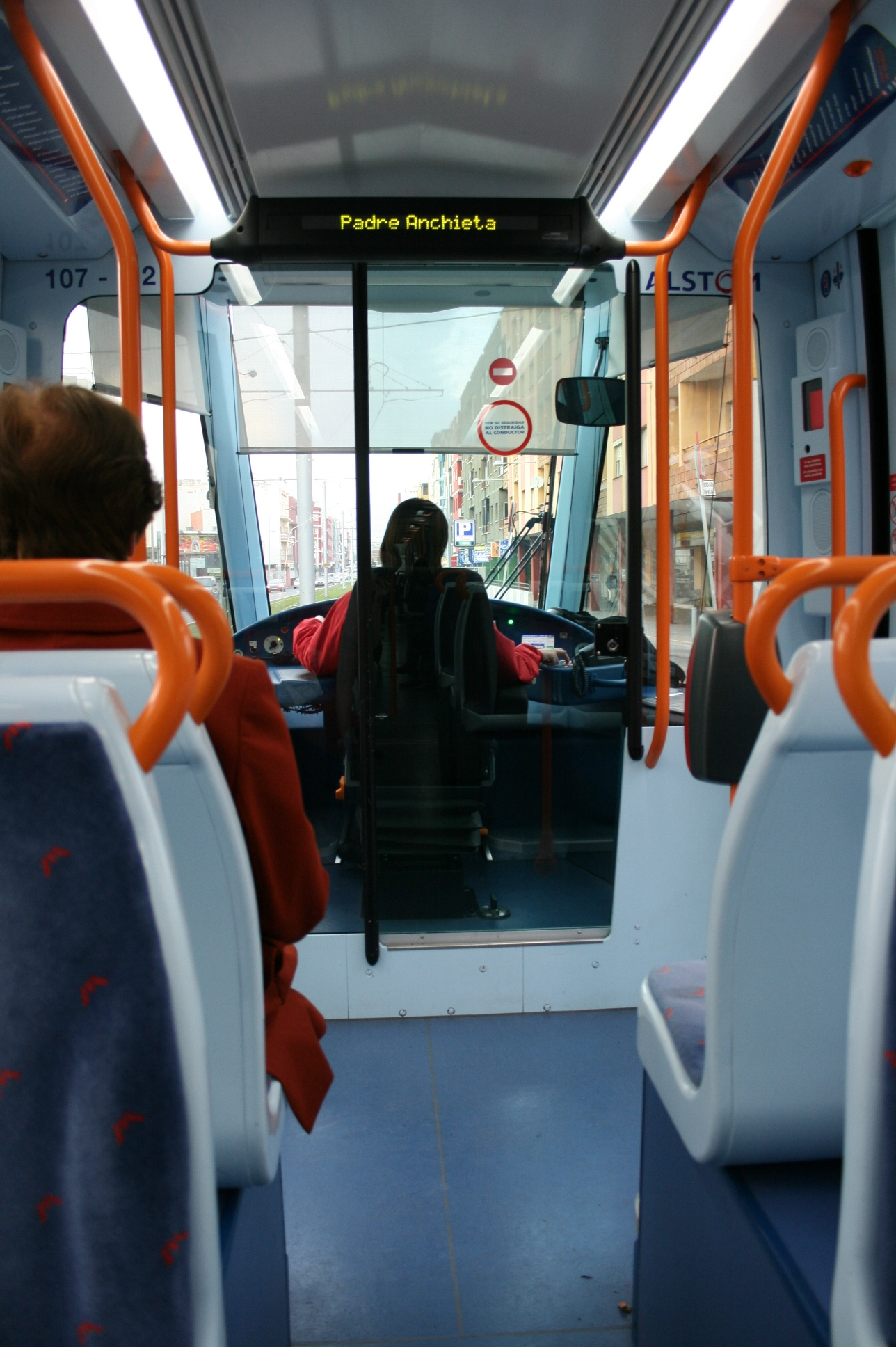 Tram auf Teneriffa, Innenraum